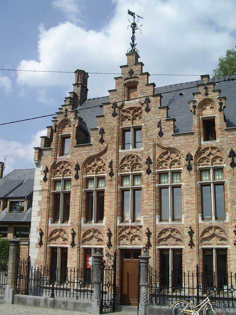 Maison flamande à Steenwerck (59, Nord)